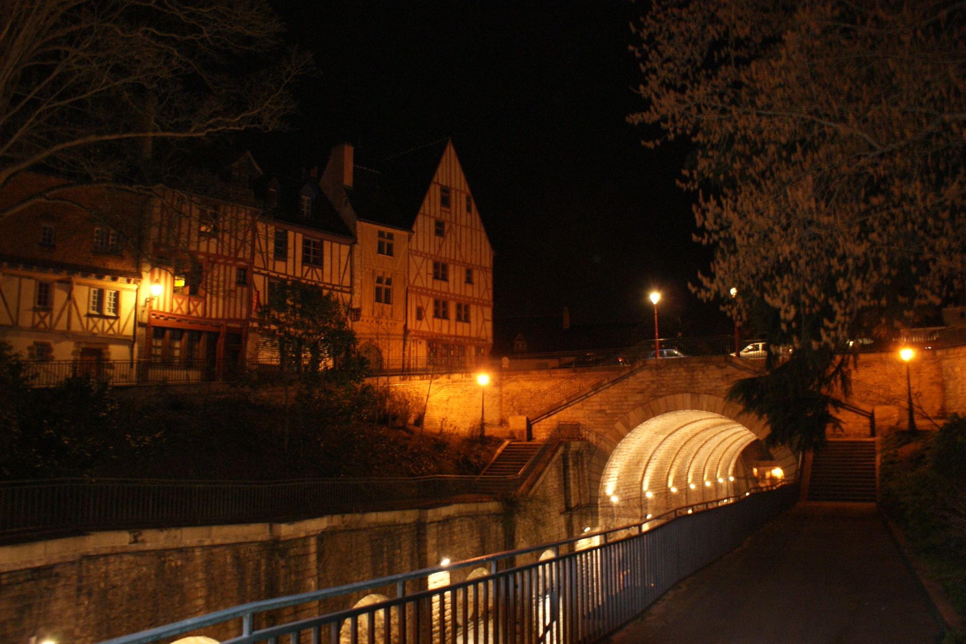 Vue des bords du tunnel du Mans, au coeur de la vieille ville.